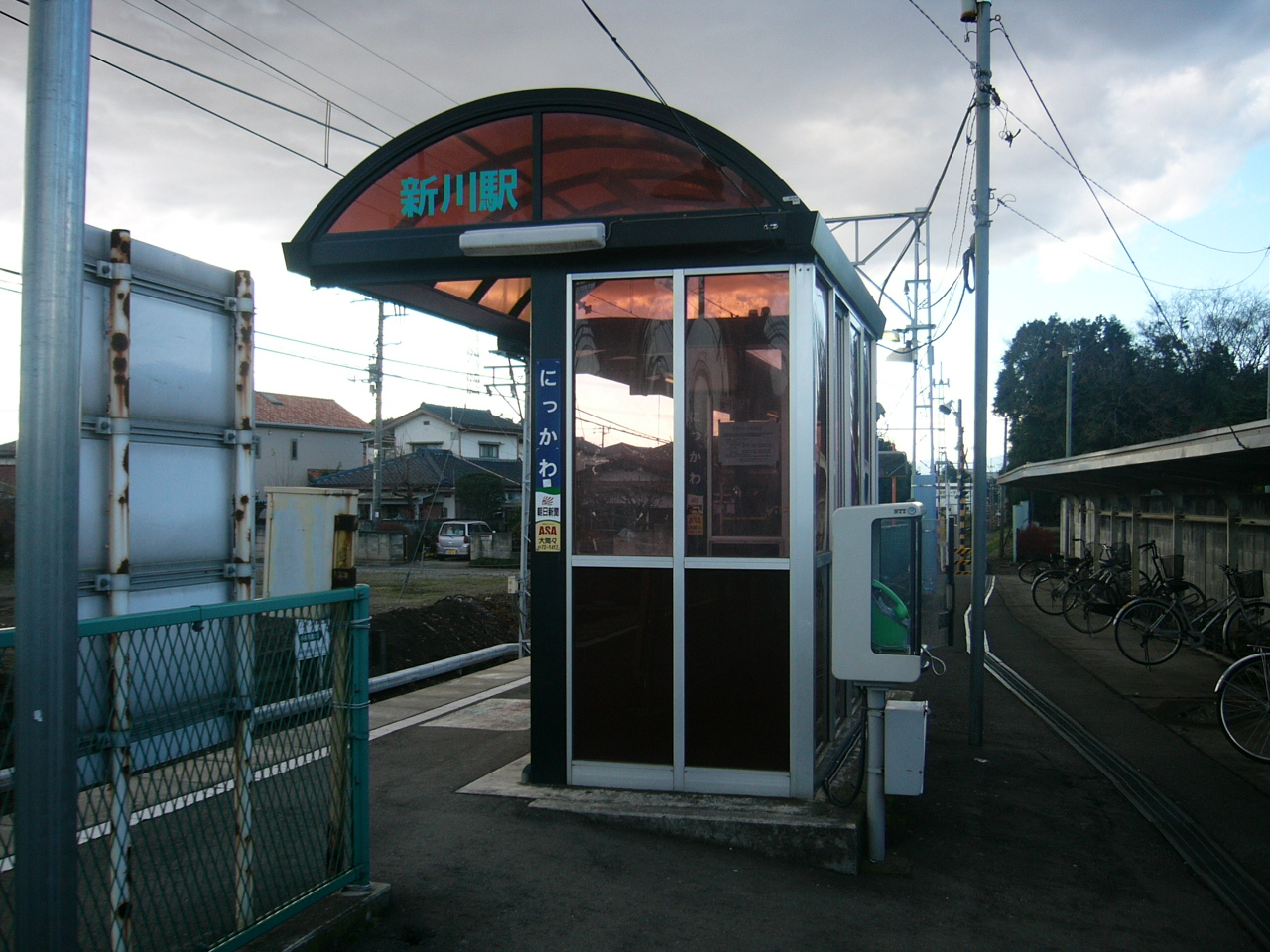 Nikkawa Station